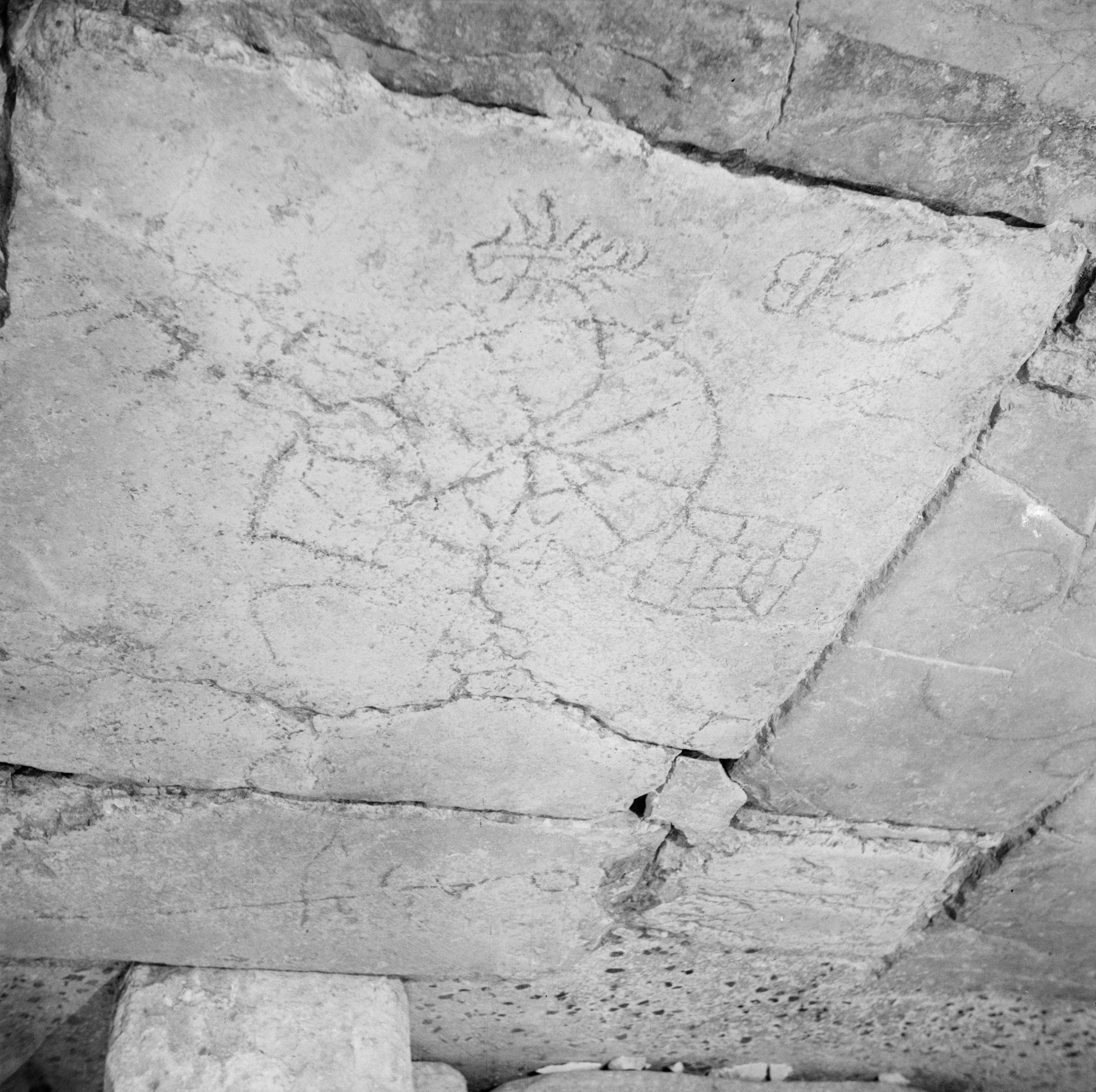 Collectie / Archief : Fotocollectie Van de Poll Reportage / Serie : Midden-Oosten 1950-1955: Jeruzalem Beschrijving : In de Lithostrotos kelder: ingekraste tekening van de doornenkroon in het originele paveisel dat ten tijde van Jezus' kruisiging de 'Via Dolorosa' bedekt zou hebben. Tweede statie Annotatie : Ten tijde van de opname lag Jeruzalem in Jordanië Datum : 1950 Locatie : Israël, Jeruzalem, Jordanië Trefwoorden : gebouwen, kelders, tegels Fotograaf : Poll, Willem van de Auteursrechthebbende : Nationaal Archief Materiaalsoort : Negatief (zwart/wit) Nummer archiefinventaris : bekijk toegang 2.24.14.02 Bestanddeelnummer : 255-5343